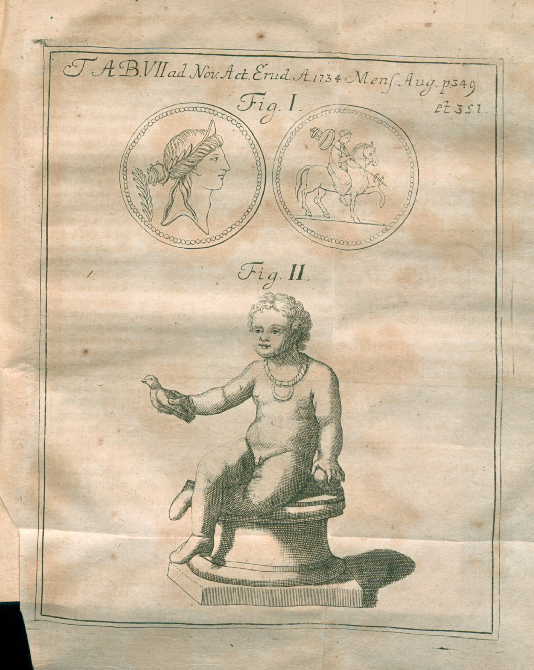 Illustration